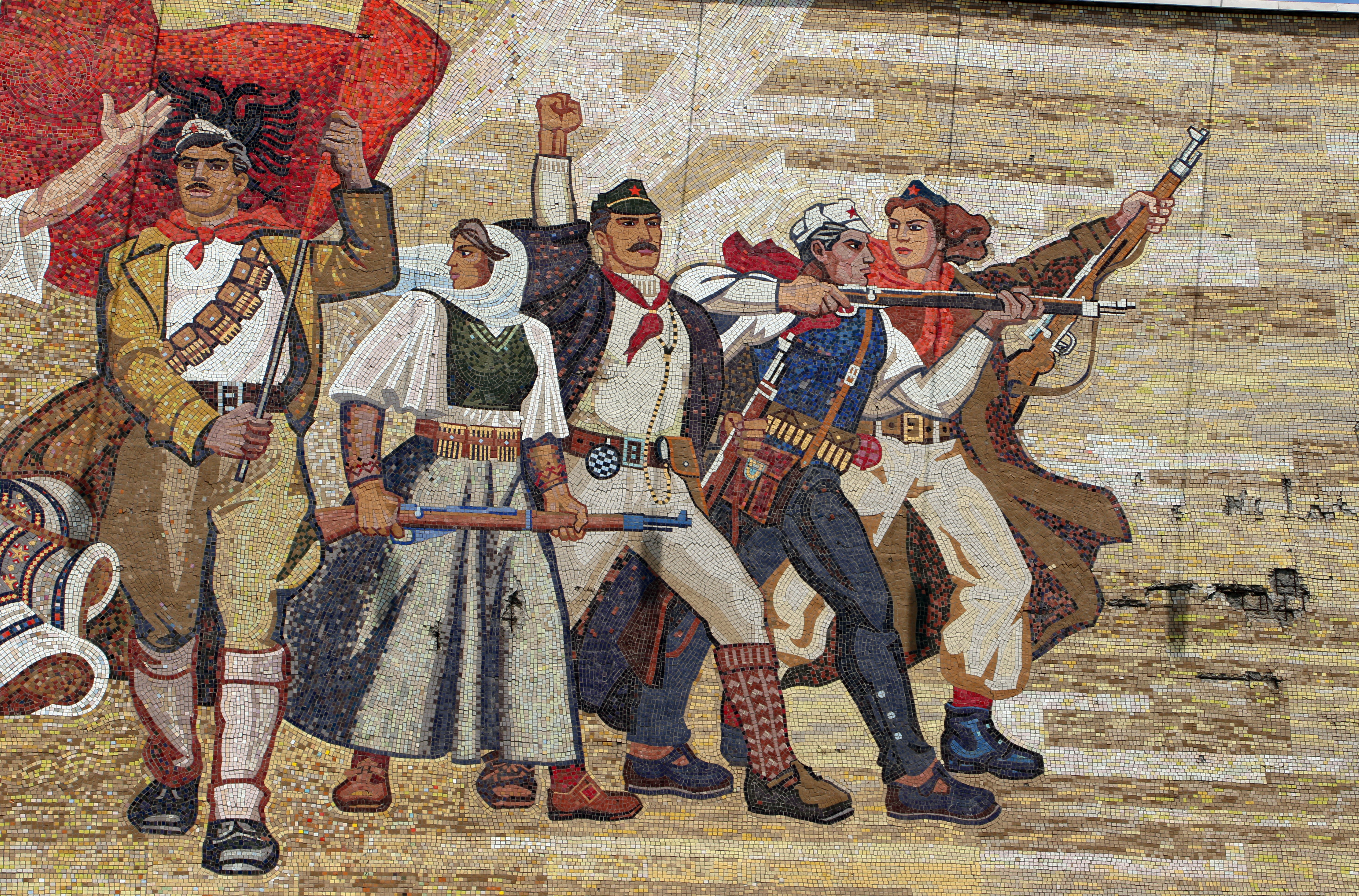 Muzeu Historik Kombëtar